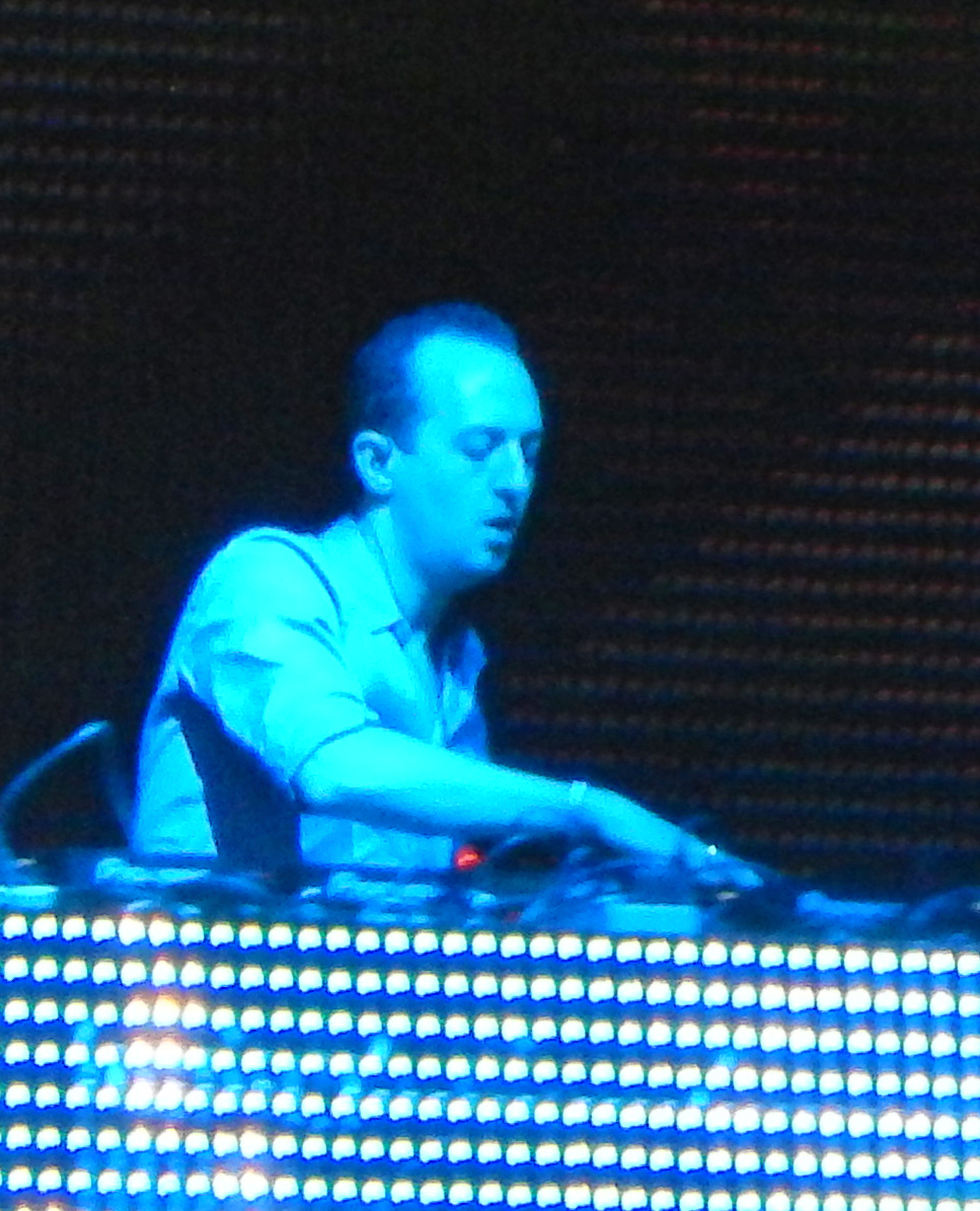 Wolfgang Gartner